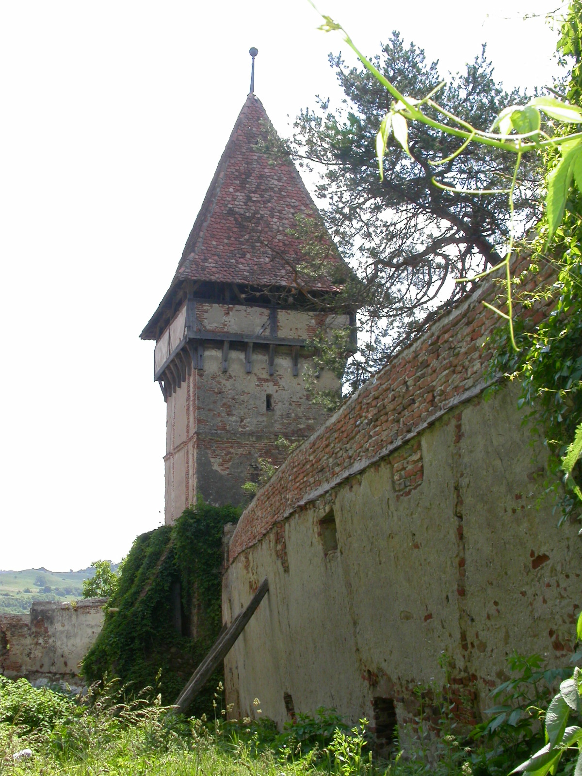 Ansamblul bisericii evanghelice fortificate, sec. XV - XVIII